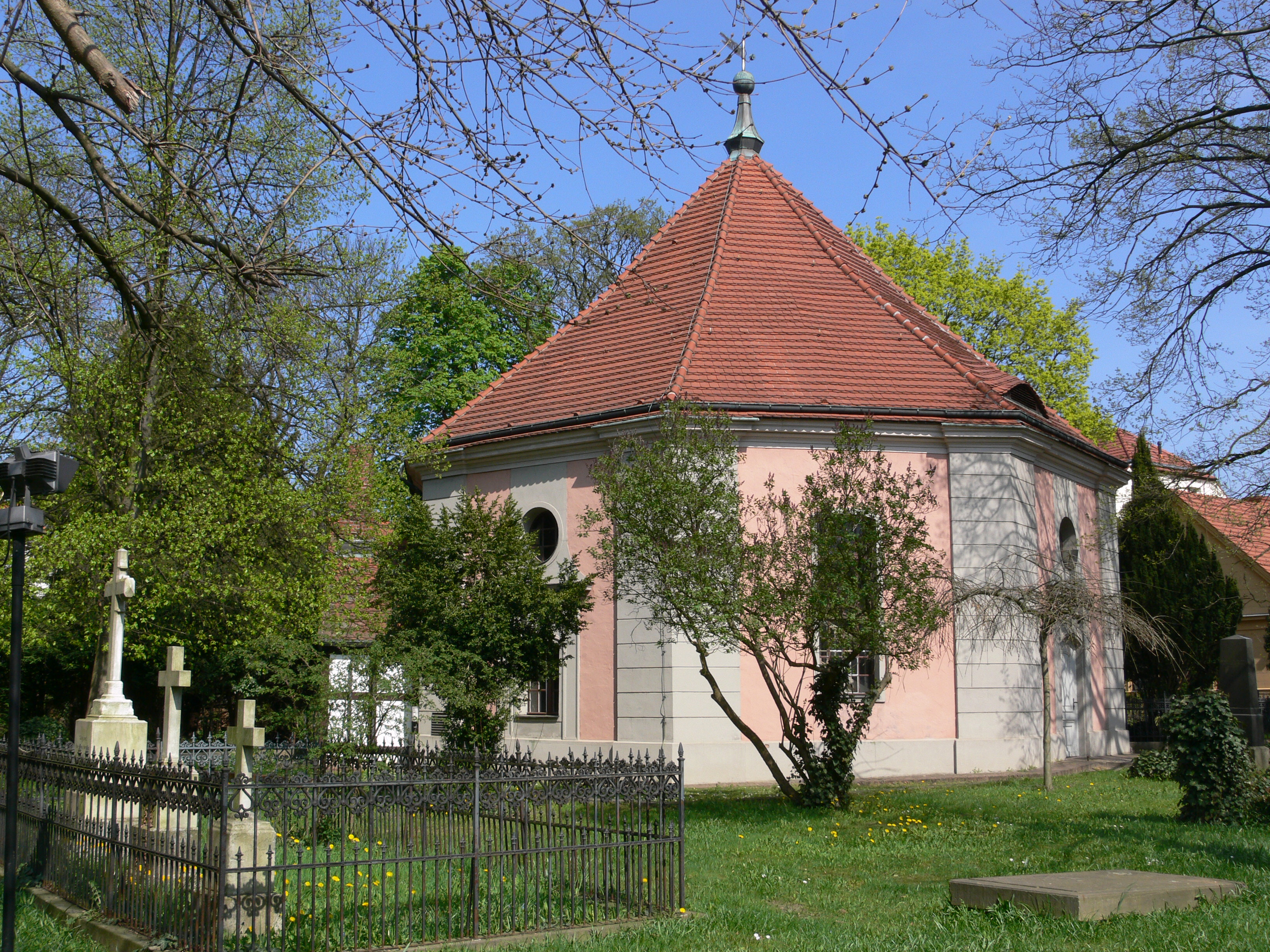 Berlin-Zehlendorf, Dorfkirche Zehlendorf